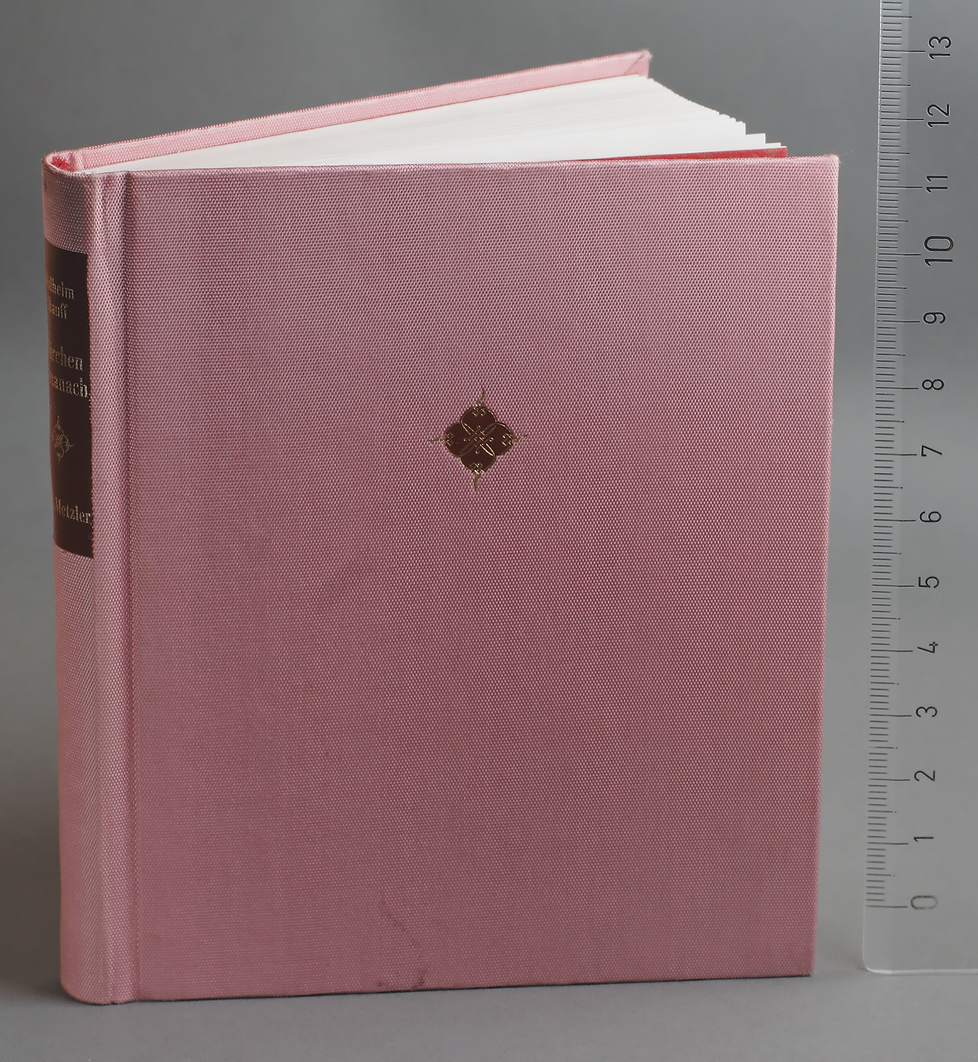 Wilhelm Hauffs Märchen-Almanach auf das Jahr 1826 in einer Faksimileausgabe von 1991 (J. B. Metzlersche Verlagsbuchhandlung).